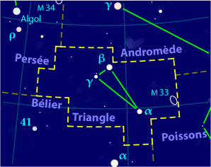 Carte pour la constellation Triangle Produite à l'aide du logiciel PP3